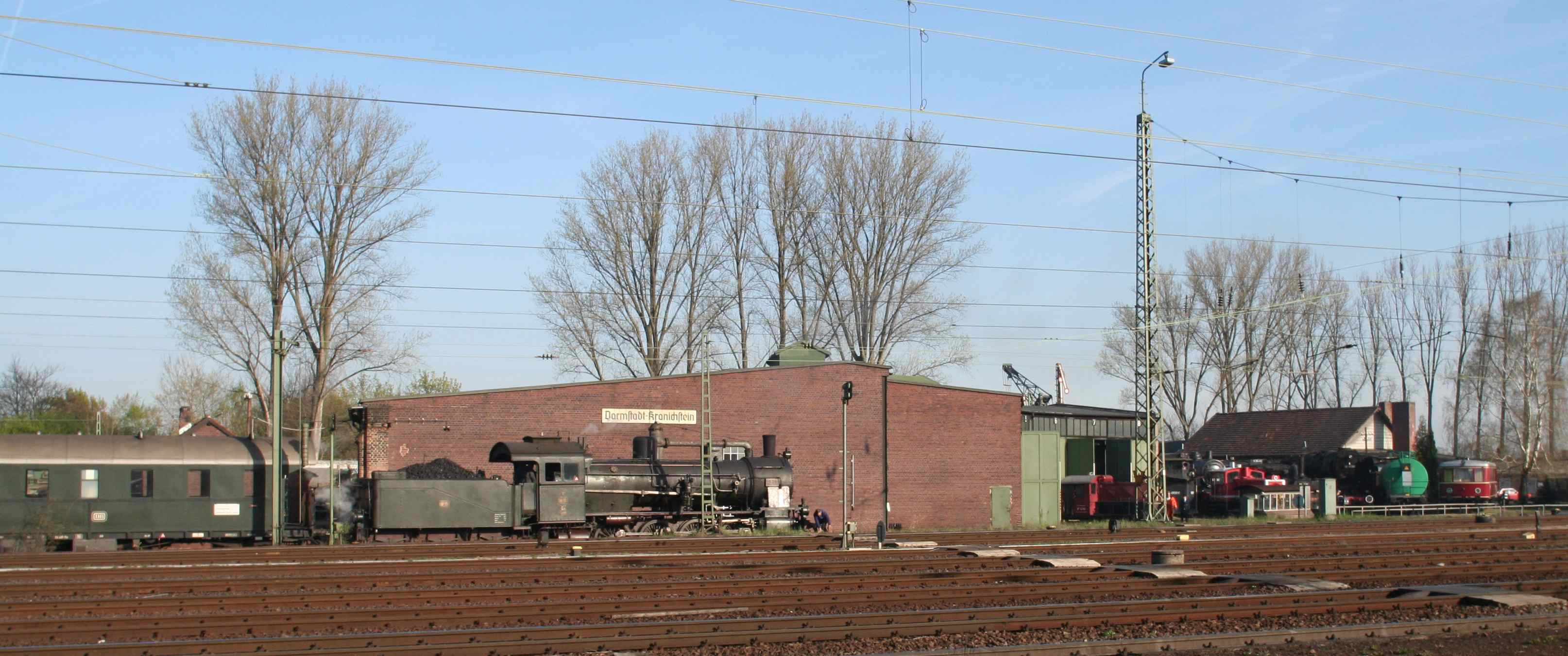 Eisenbahnmuseum Darmstadt-Kranichstein, Darmstadt (Germany)